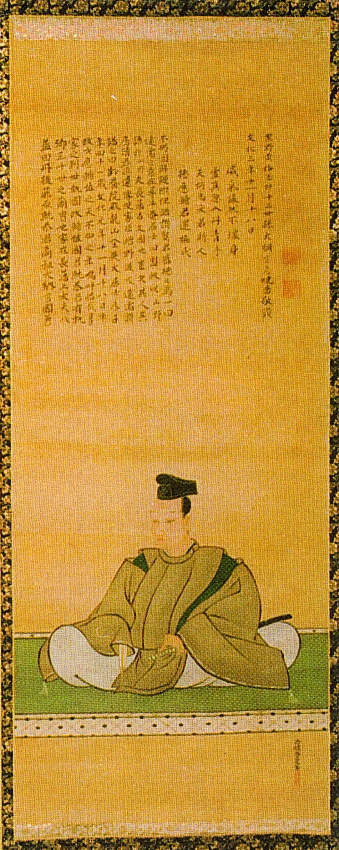 益田氏30代当主・益田就恭の肖像画。萩市指定有形文化財。